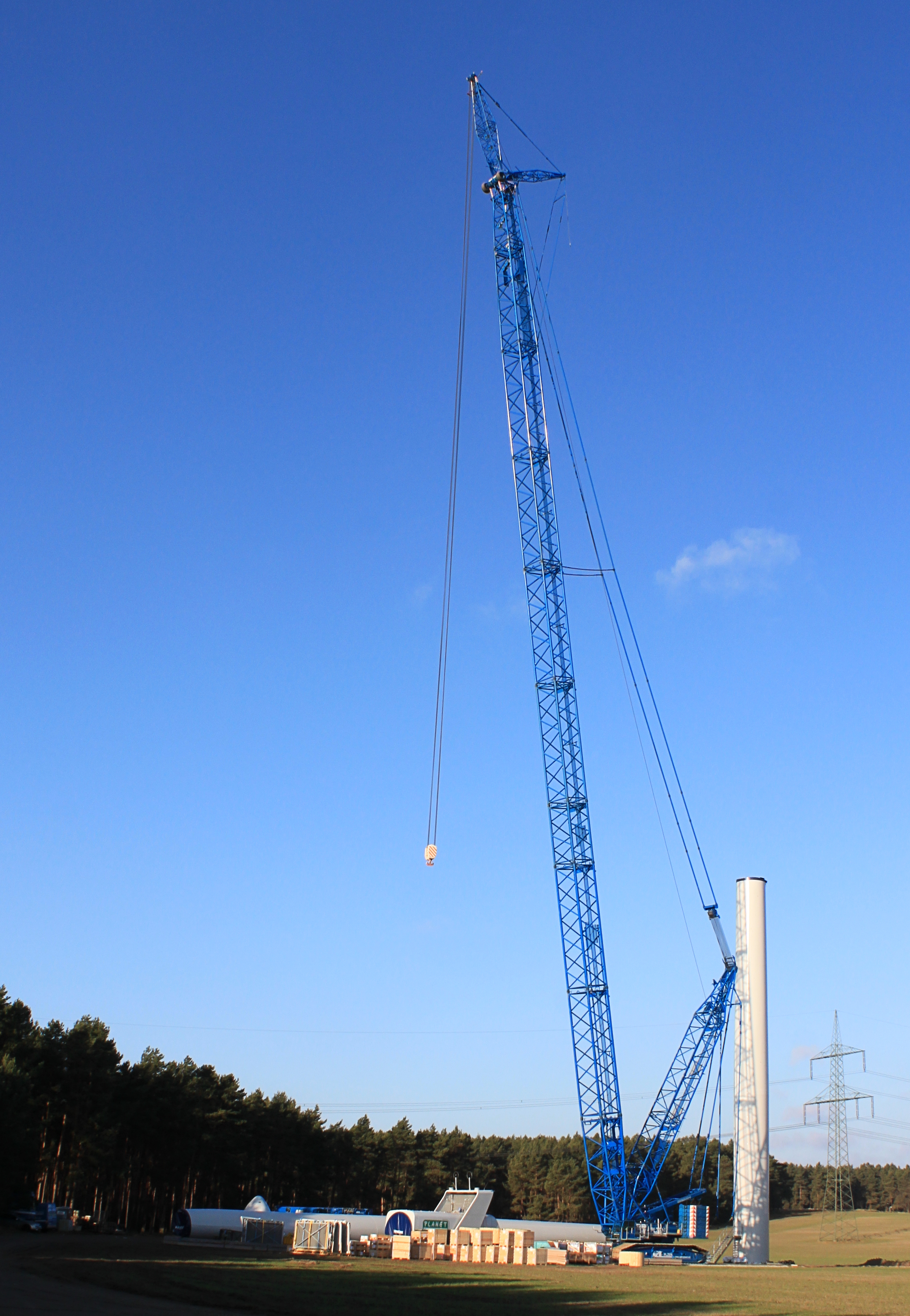 TEREX CC 2800-1 der Tschechischen Firma APB Plzeň, Vorbereitung des Raupenkranes, bevor er zum Bau von Windrädern bei Oelsing (Schlieben) eingesetzt wird.